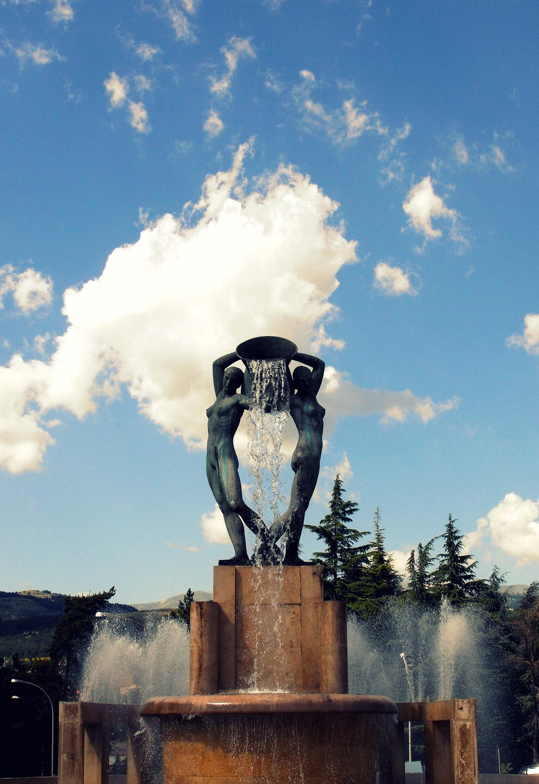 Fontana luminosa (L'Aquila)